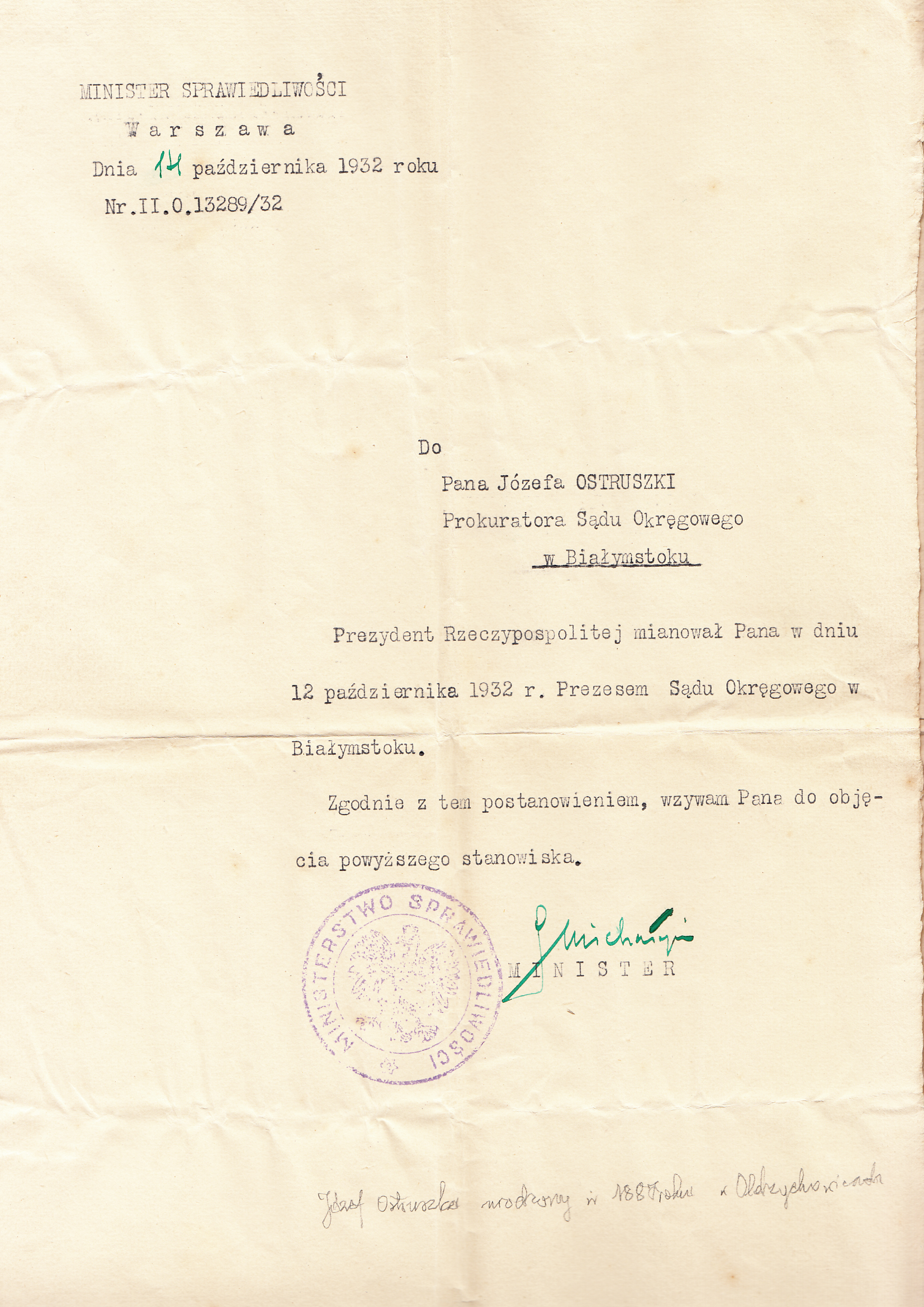 Akt mianowania Józefa Ostruszki Prezesem Sądu Okręgowego w Białymstoku.